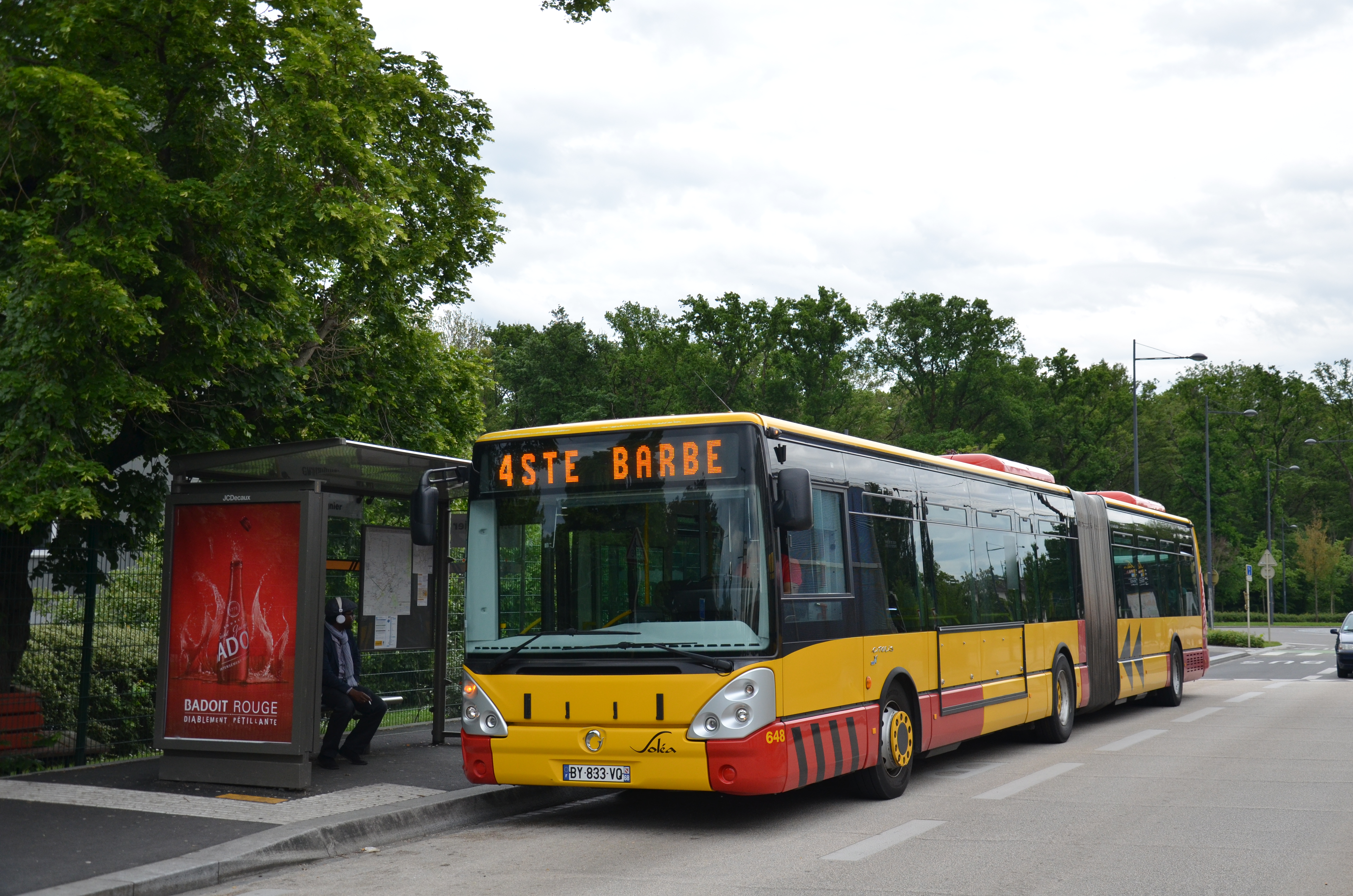 Irisbus Citelis 18 n°648 sur la ligne 4 BHNS du réseau SOLEA de Mulhouse, à l'arrêt Châtaignier.